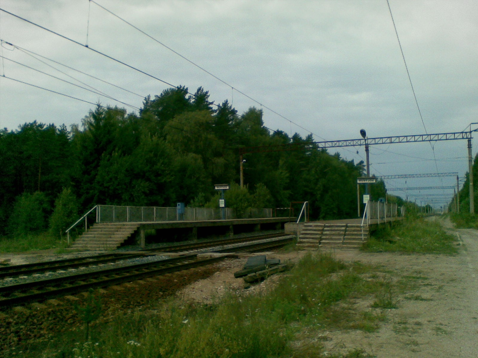 Mustjõe raudteepeatuse vanad perroonid.